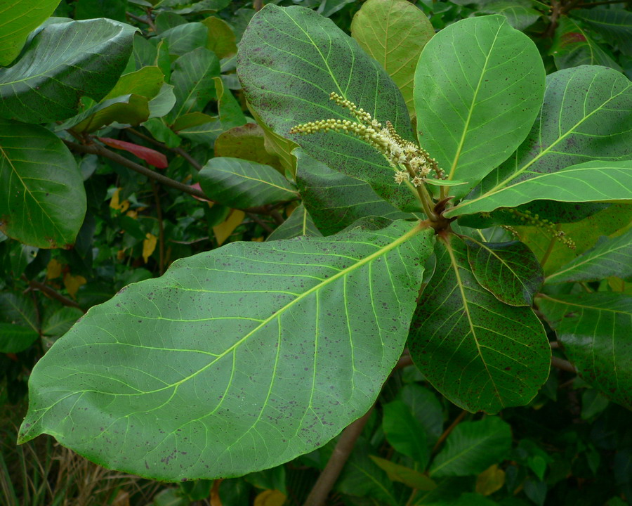 Terminalia catappa, feuilles et épis, Guadeloupe